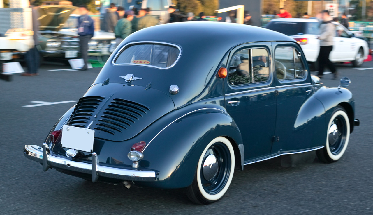 1957 Hino-Renault 4CV